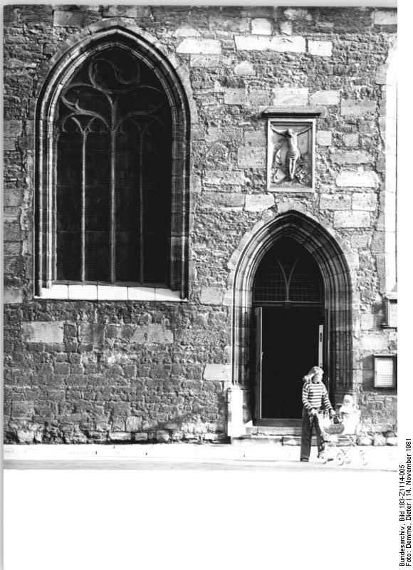 Erfurt, Michaeliskirche ADN-ZB Demme 14.11.81 Lutherstätten in Erfurt: Eingang zur Micheliskirche, die als ehemalige Universitätskirche zu den Lutherstätten in der DDR zählt. Es ist anzunehmen, daß Martin Luther während seines Studiums an der Erfurter Alma mater (1501-1505) auch die Universitätskirche besuchte. (siehe auch Z1114-1,2,3 u. 4n)